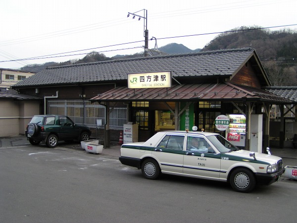 四方津駅 2006年1月4日午後4時10分 (JST) ごろに投稿者が撮影。